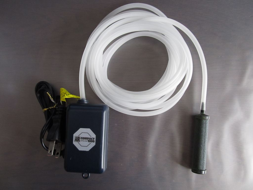 エアポンプとホースとストーン